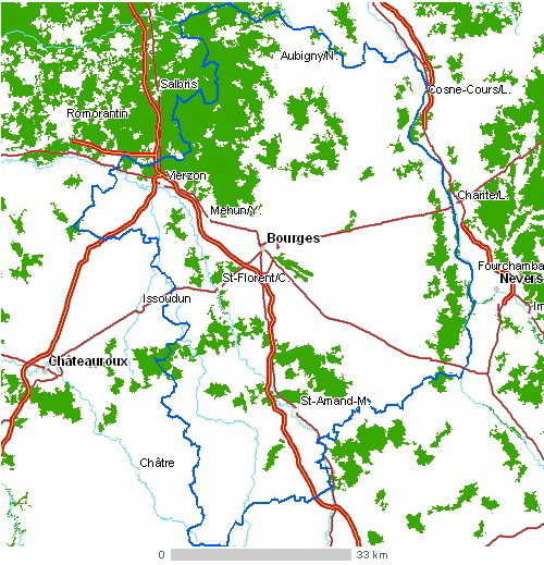 Carte du département Cher Légende